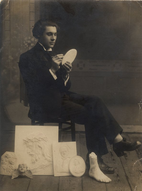 Matas Menčinskas (1896 m. rugsėjo 15 d. Ostampas, Simno valsčius – 1942 m. kovo 18 d. Kaunas) – Lietuvos skulptorius, tapytojas.